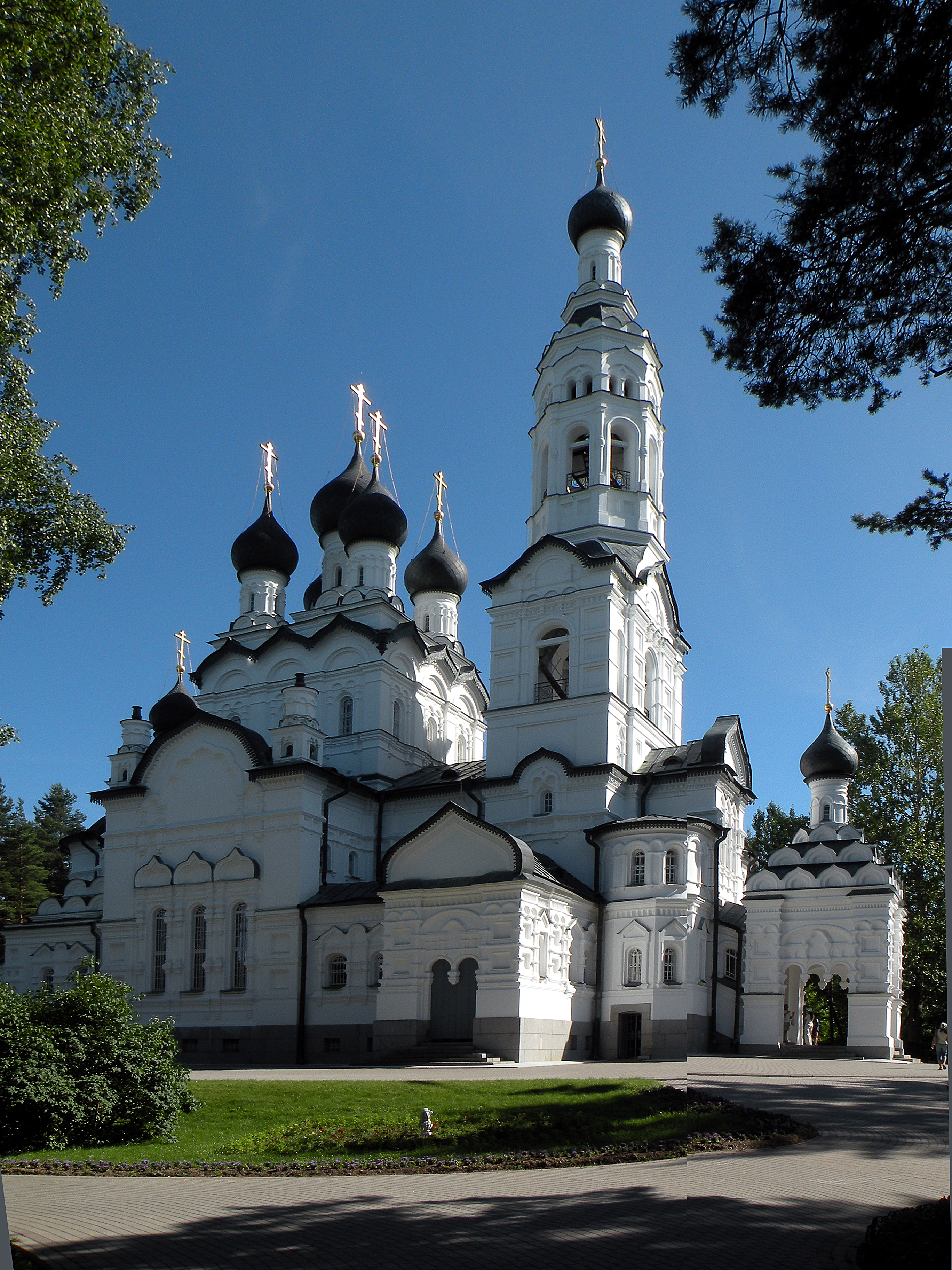 Териоки (Зеленогорск). Казанская церковь.